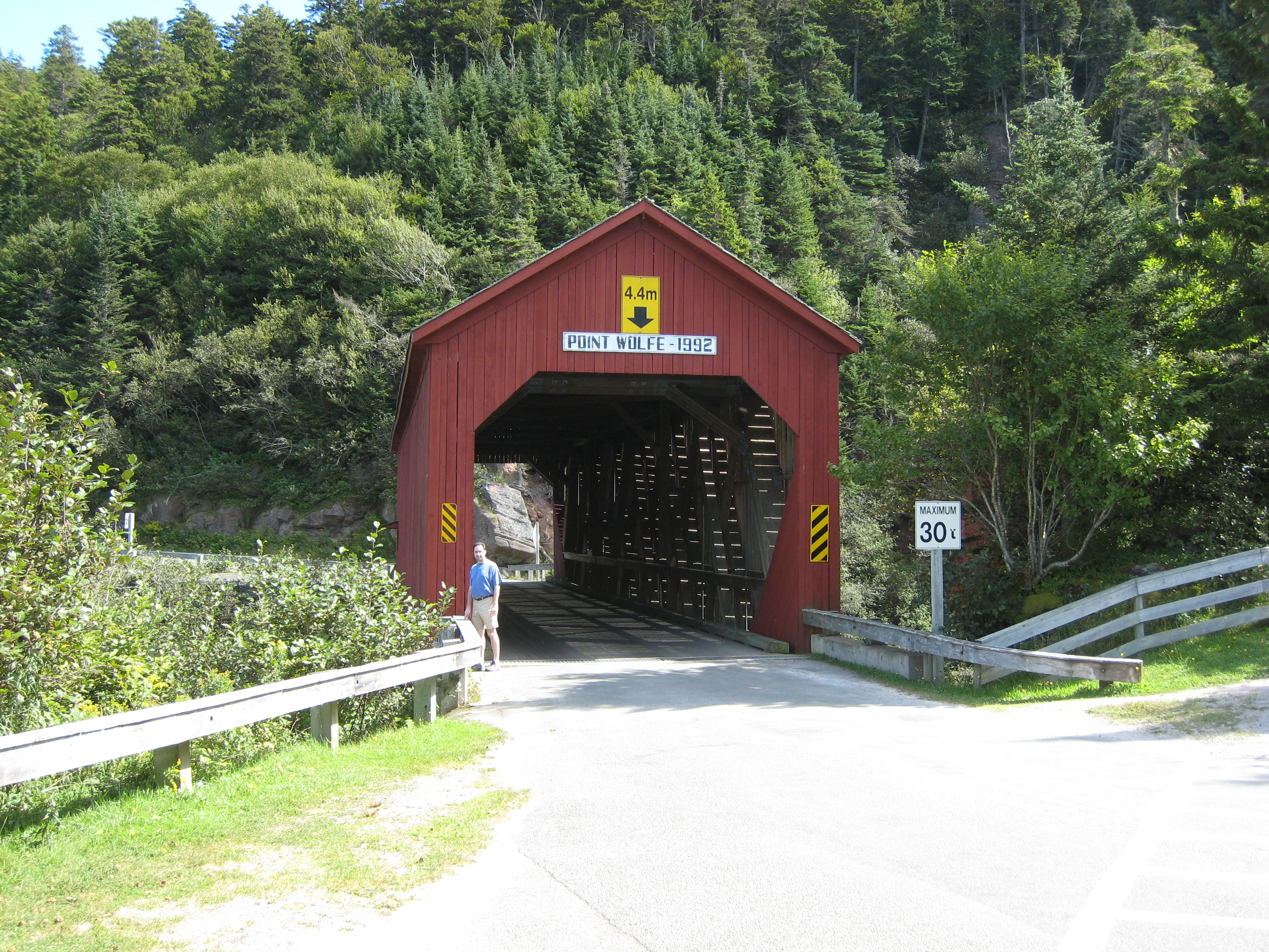 Pont de Point Wolfe vue de la route dans le parc national de Fundy